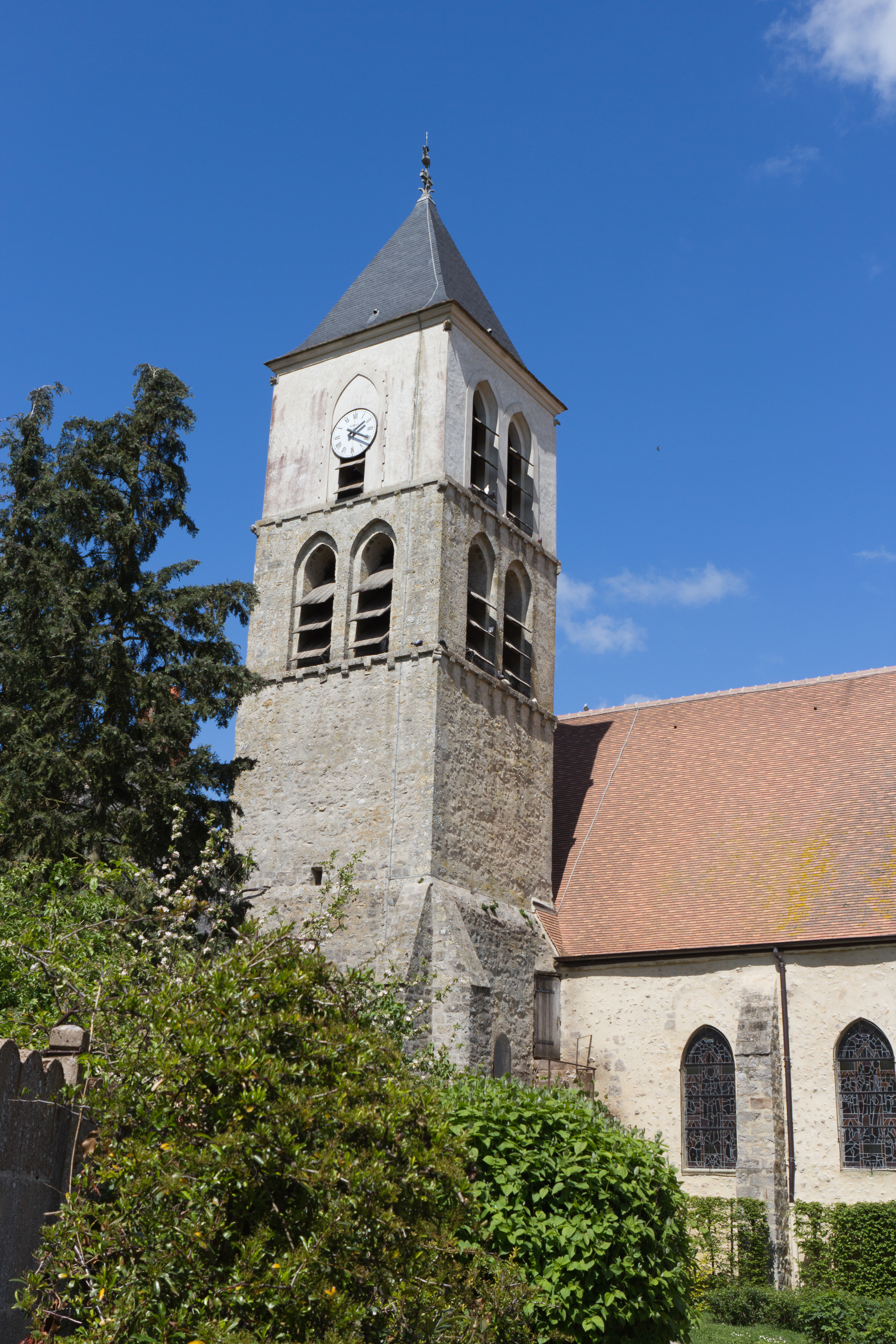 Église de Cerny, Cerny, département de l'Essonne, France.